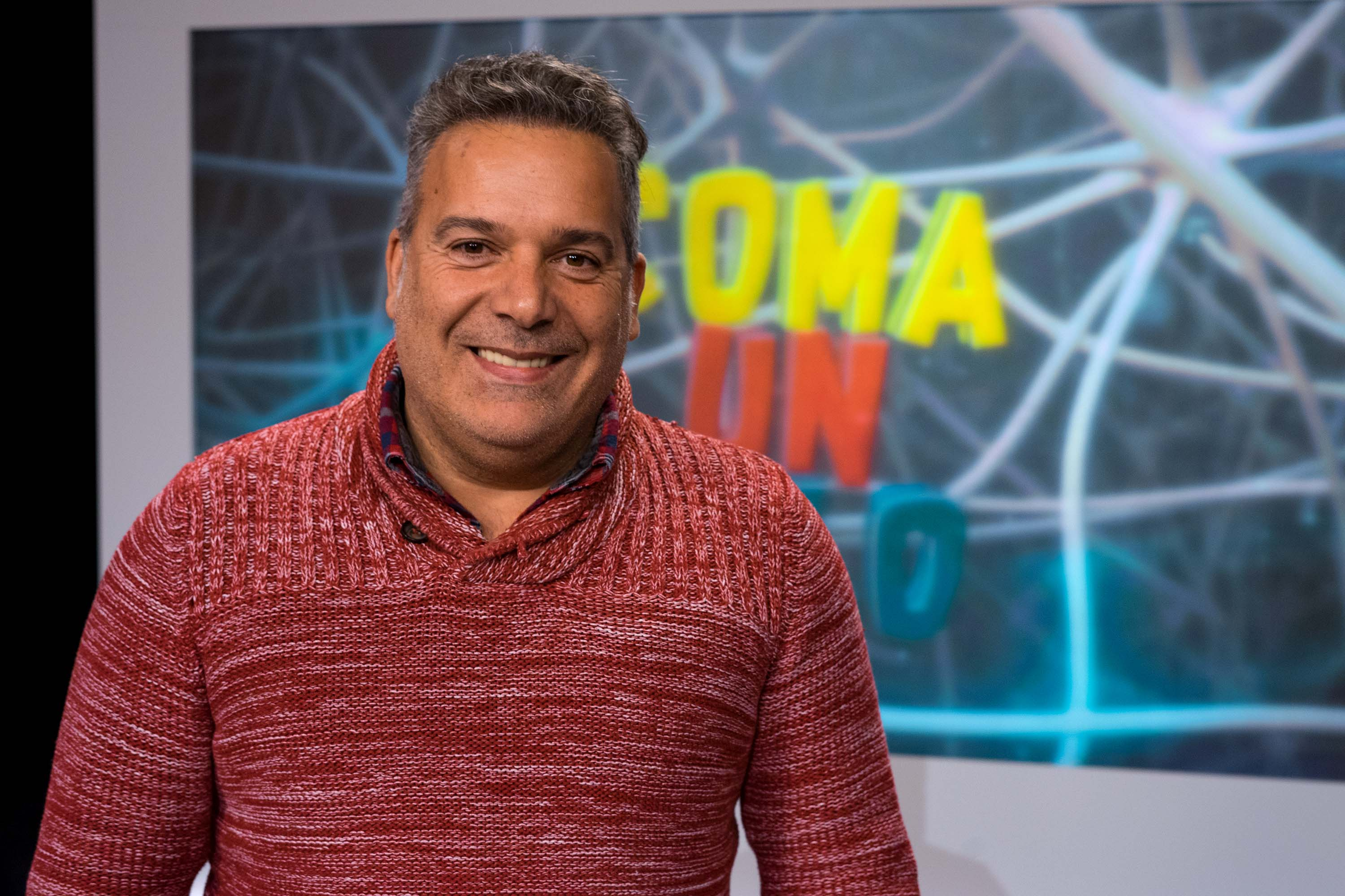 Paco Lodeiro no plató do programa Coma Un Allo, do que é director